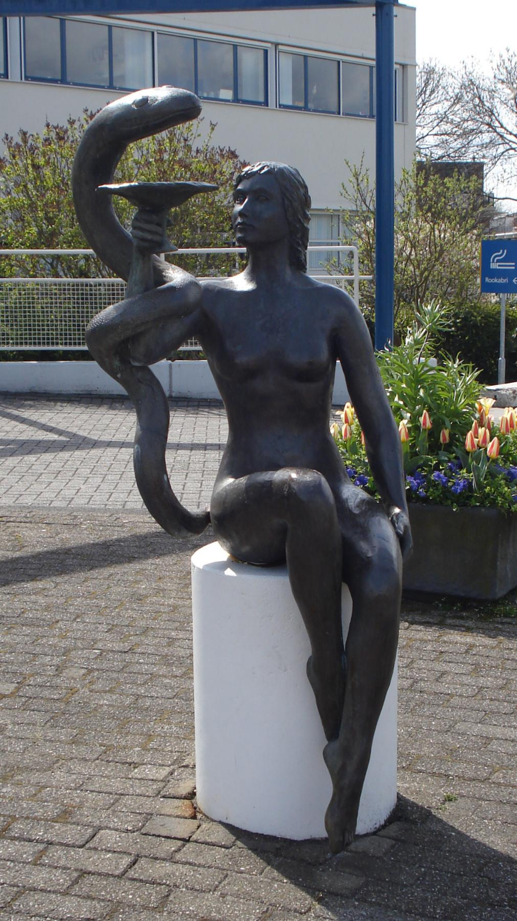 Spijkenisse, bij de ingang van het Ruwaard van Puttenziekenhuis. Kunstwerk "Hygieia" van Hansje den Hollander uit 1990. The Netherlands. The photographical reproduction of this work is covered under the article 18 of the Dutch copyright law, which states that “it is not an infringement of copyright to reproduce and publish pictures of a work, as meant in article 10, first paragraph, under 6°[1] or of an architectural work as meant in article 10, first paragraph, under 8°[2], which are made to be permanently located in a public place, as long as the work is depicted as it is located in the public space. Where incorporation of a work in a compilation is concerned, not more than a few of the works of the same author may be included”. [1] drawings, paintings, works of architecture and sculpture, lithographs, engravings and the likes [2] drafts, sketches and three-dimensional works relating to architecture, geography, topography or other sciences Note that photographs are not included in Item 6. They are separately listed at Item 9 and are therefore not covered by FOP. See COM:CRT/Netherlands#Freedom of panorama for more information. .